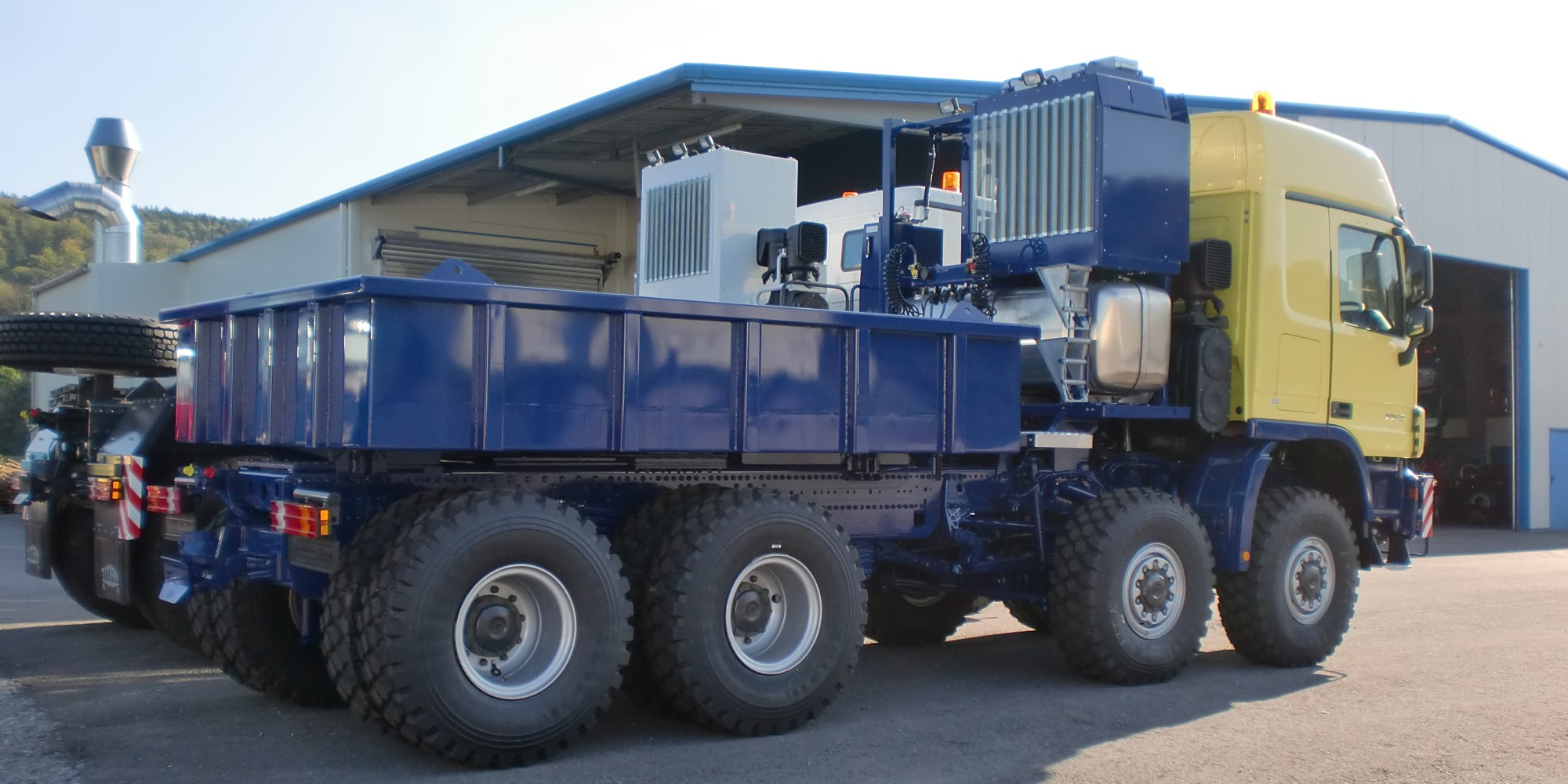 Titan-Schwerlastzugmaschinen mit hinter dem Führerhaus turmartig angeordneten Aggregaten, insbesondere Tank und Getriebeölkühler.